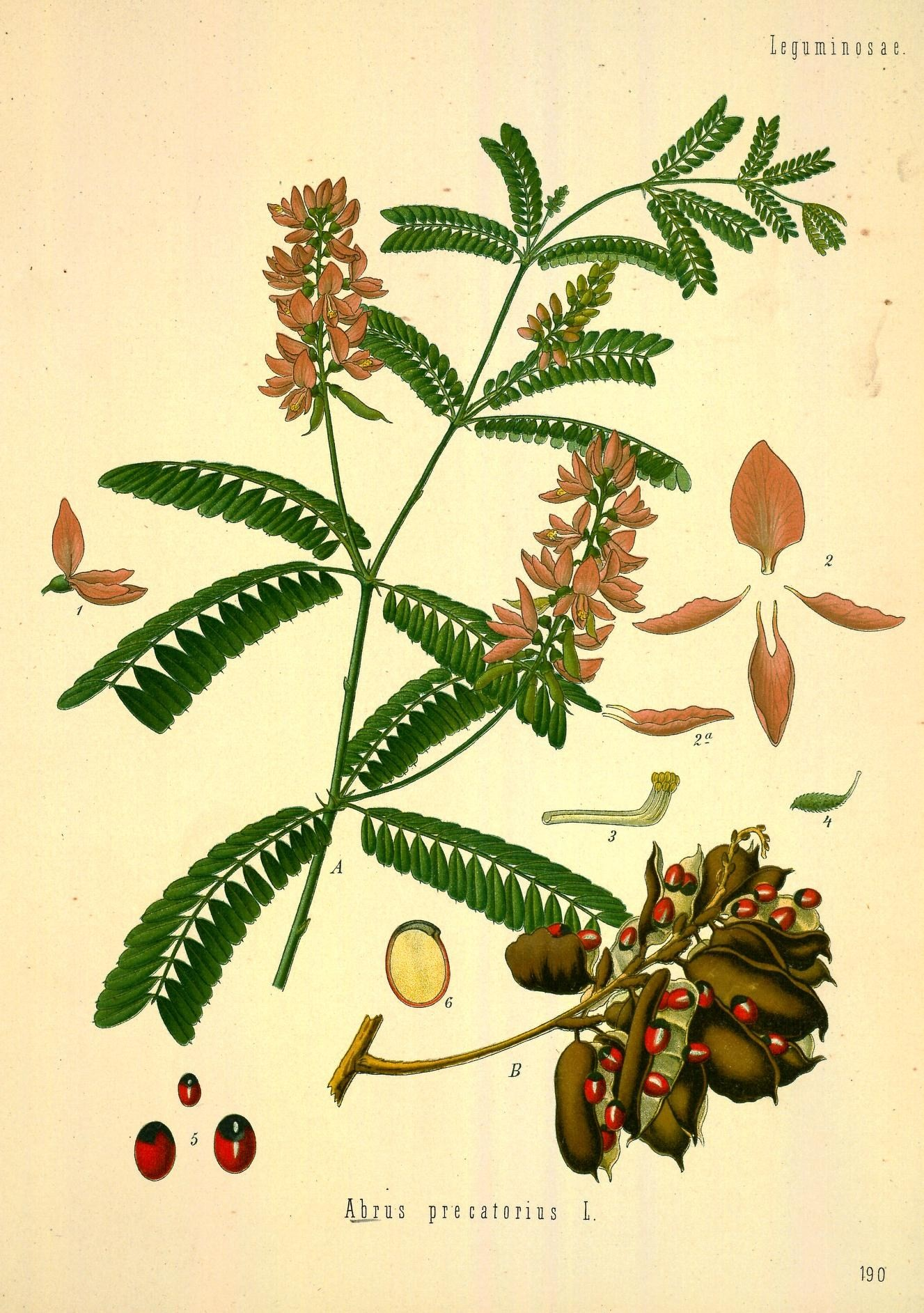 Paternostererbse. A blühender Zweig, natürl. Grösse; B Fruchttraube, desgl.; 1 Blüthe, wenig vergrössert; 2 u. 2a Kronenblätter, vergrössert; 3 Staubgefässe, desgl.; 4 Stempel, desgl.; 5 Samen, natürl. Grösse und vergrössert.